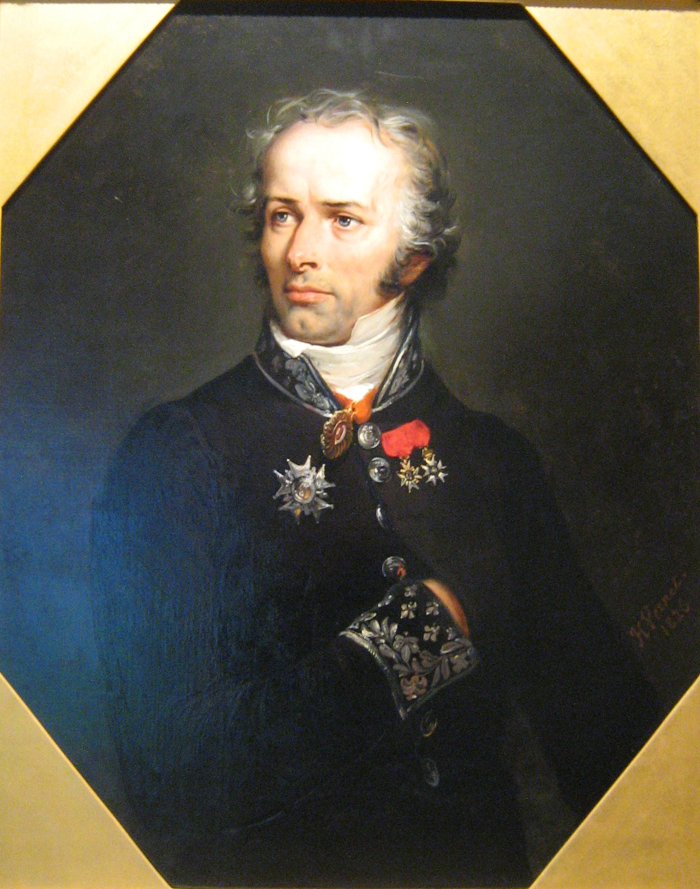 Portrait du général Maximilien Sébastien Foy portant l'ordre du croissant turc, par Horace Vernet.